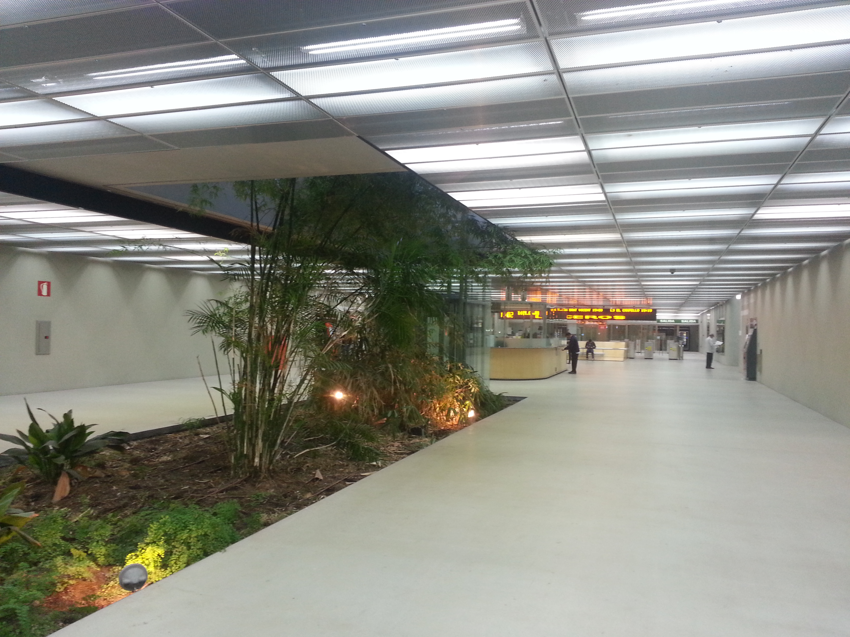 Vestíbulo Estación de Luceros del TRAM de Alicante